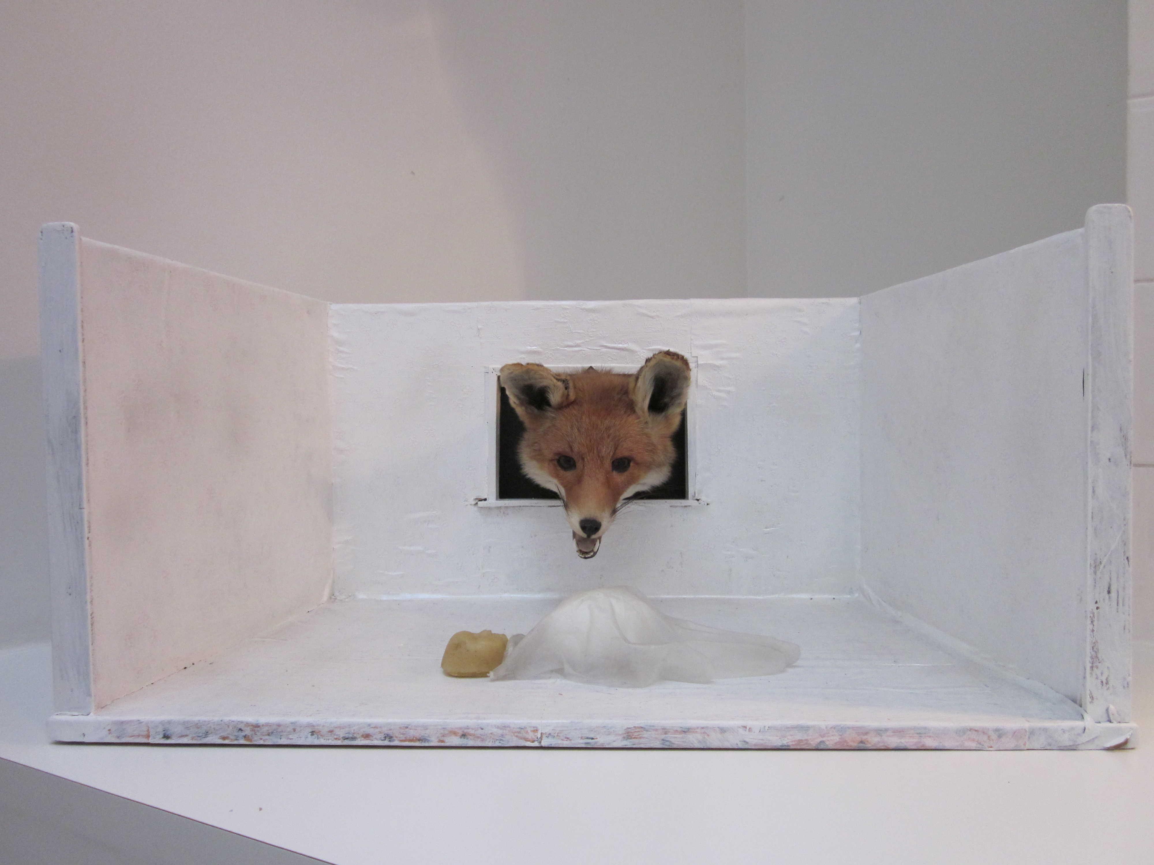 Traumpaar